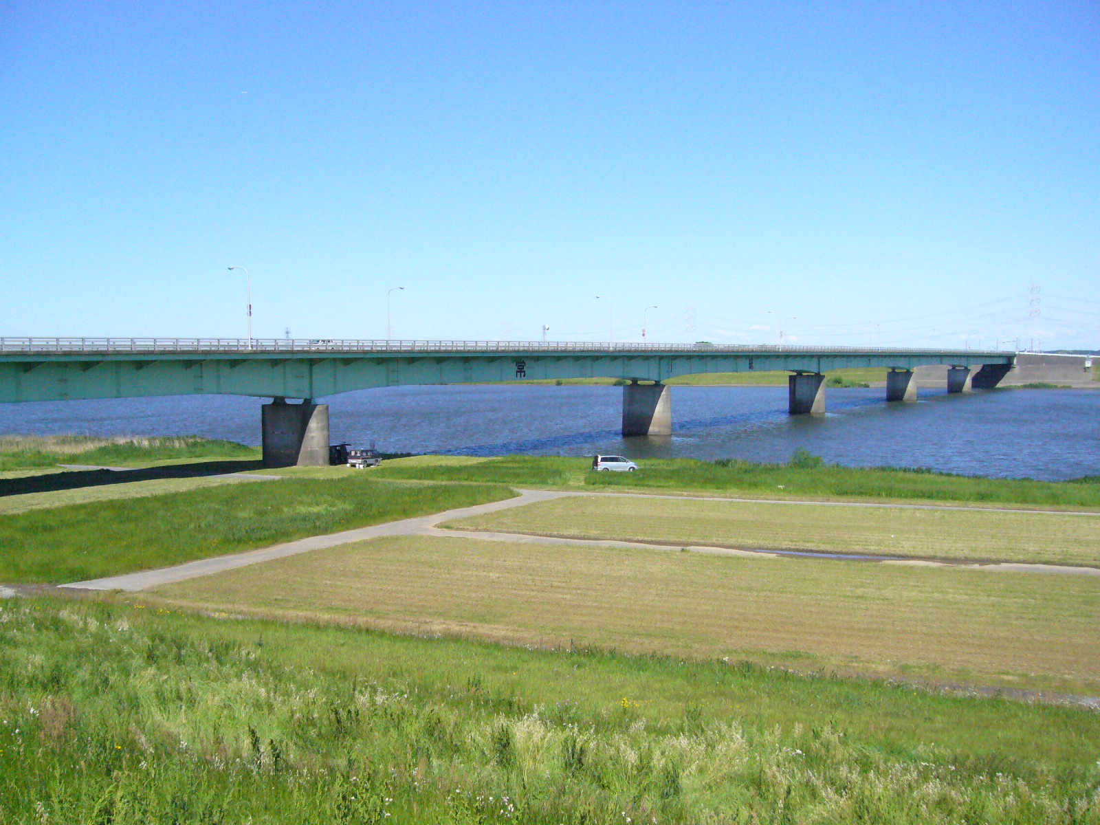 jyoso-bridge,narita-city,japan